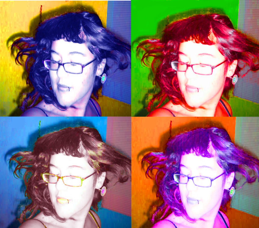 Pop artový motiv.